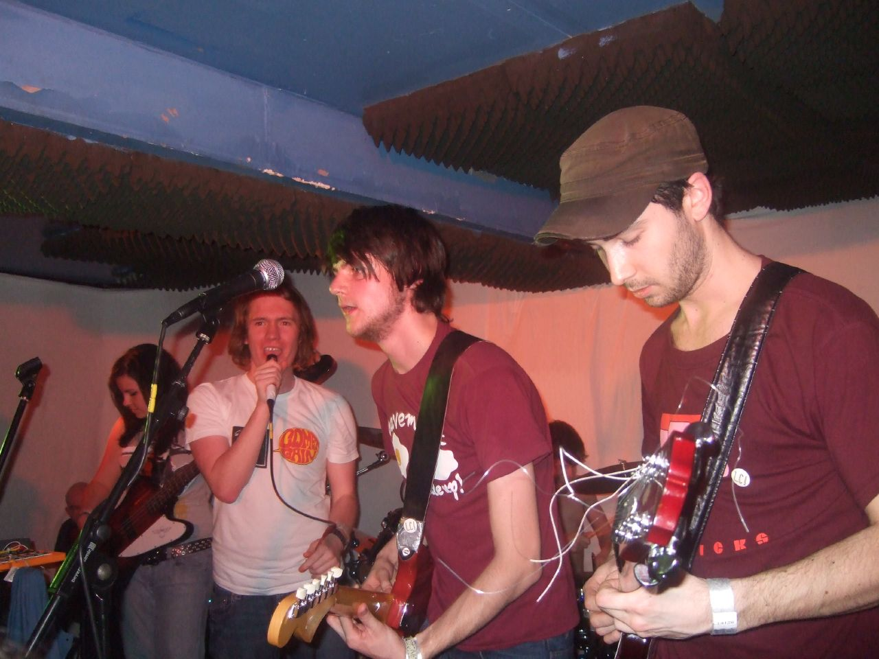 Los Campesinos! Bristol Louisiana Ellen, Gareth, Neil, Tom